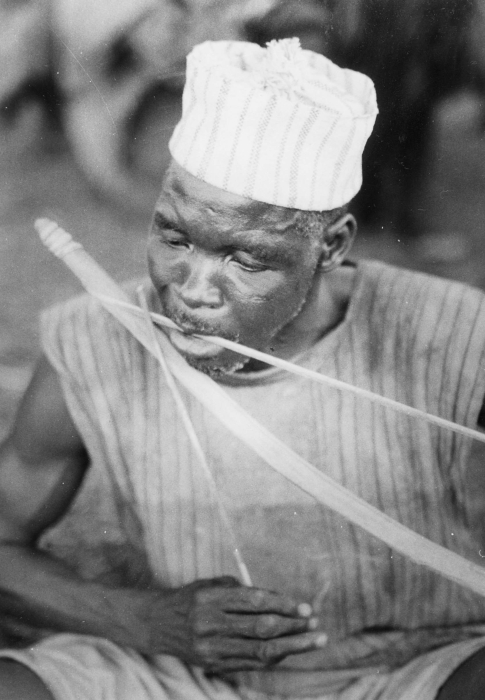 De opname is gemaakt tijdens één van de twee verzamelexpedities die het Tropenmuseum in 1970-1971 ondernam ter voorbereiding op de grote tentoonstelling in 1971-1972, getiteld 'Samo. Een Afrikaans Savannevolk in ontwikkeling'. De expedities duurden elk drie maanden en werden uitgevoerd door de heren J.T. Broekhuijse en F.M. Cowan. De muzikant met muziekboog staat ook afgebeeld op de groepsopname in de catalogus bij de hierboven genoemde tentoonstelling met het bijschrift 'Het dorpsorkest treedt op bij bijzondere gelegenheden' (1971: 13).